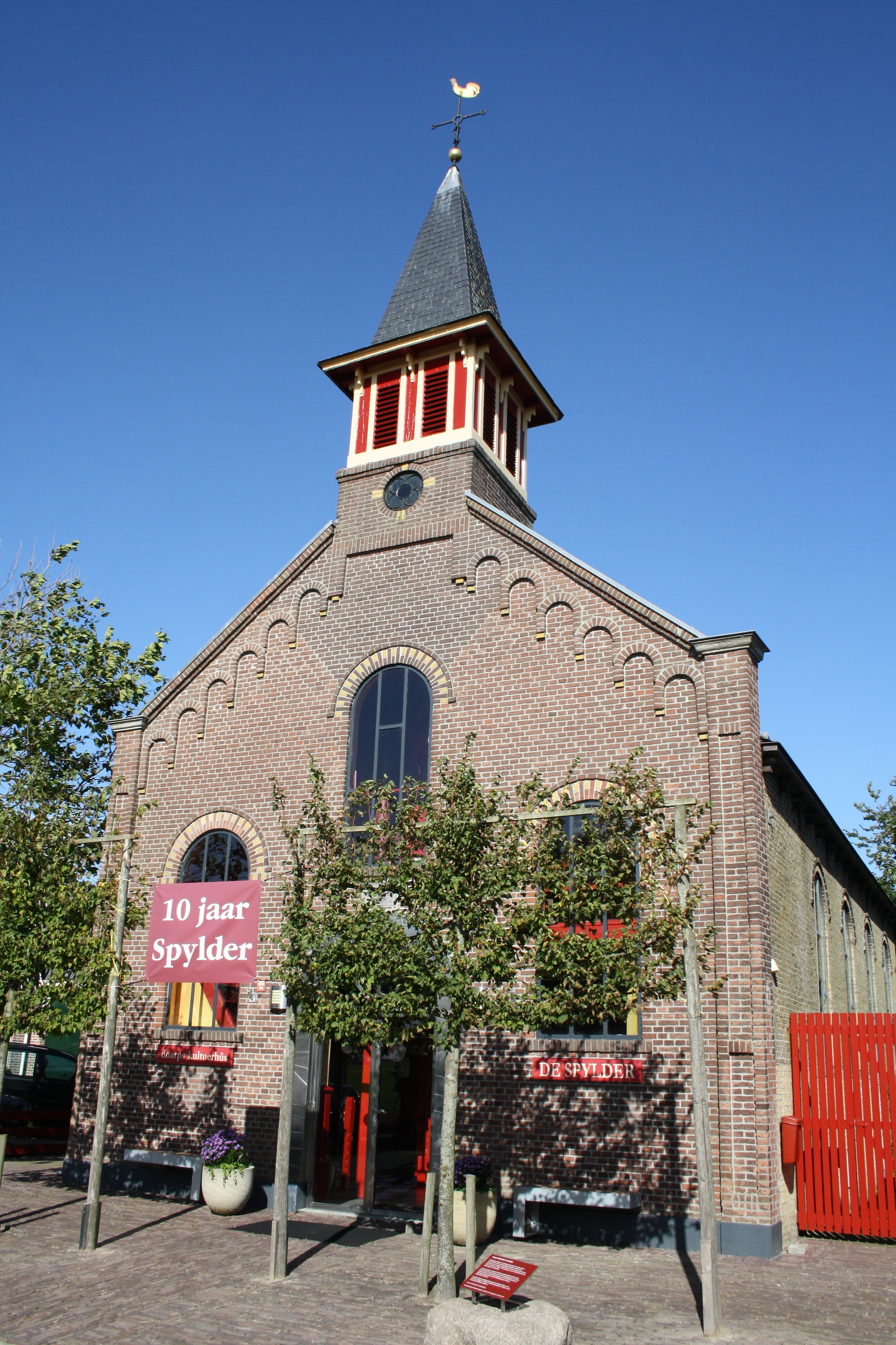 Vroegere Gereformeerde kerk nu buurthuis